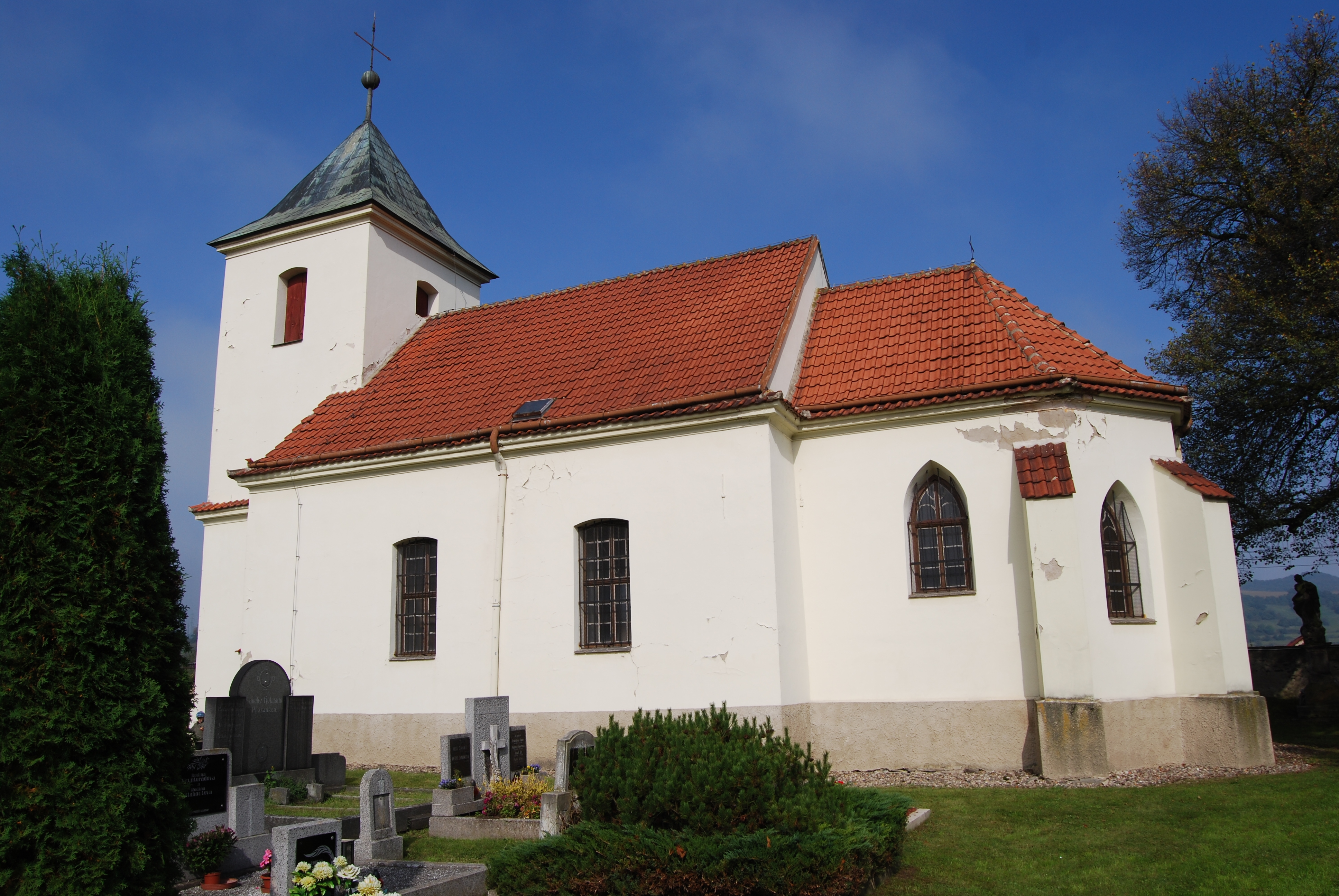 Kostel svatého Václava, Brozánky (Řehlovice)